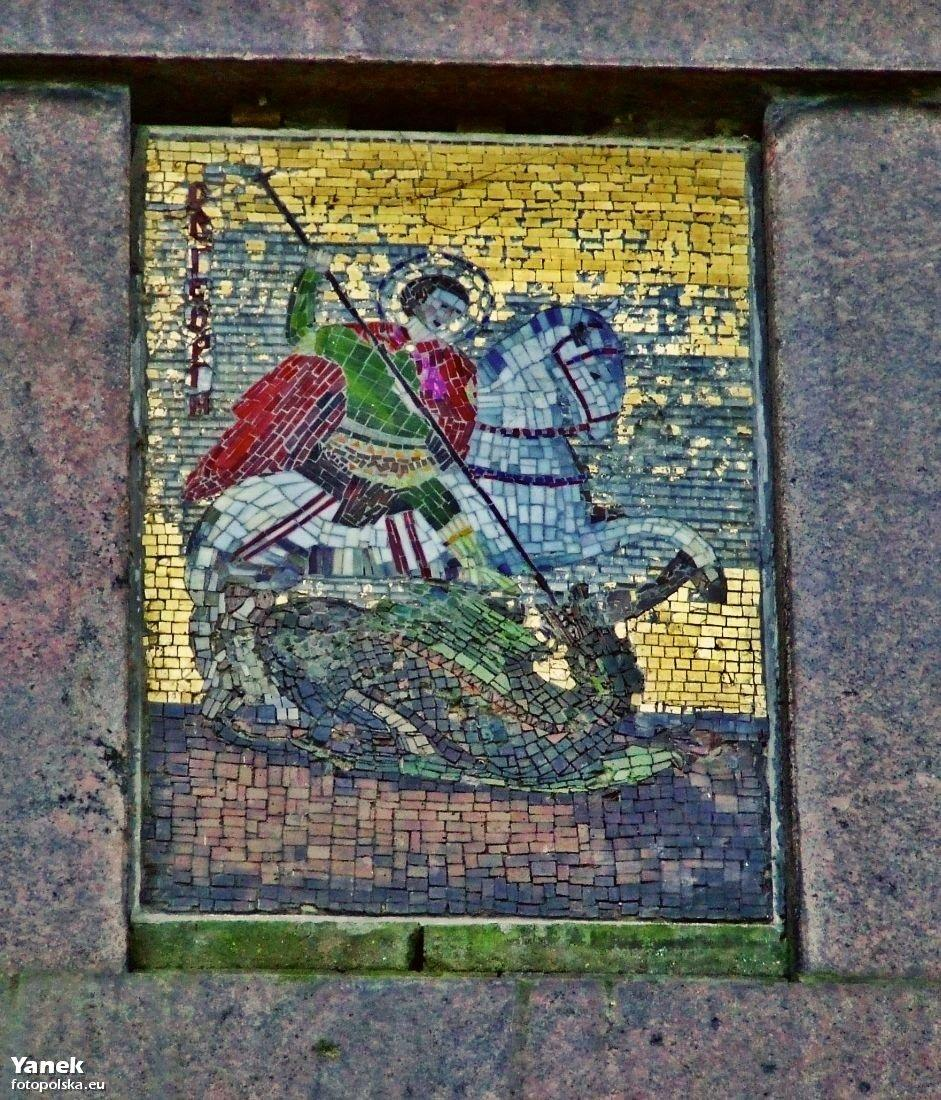 Mozaika na pomniku z św. Jerzym.